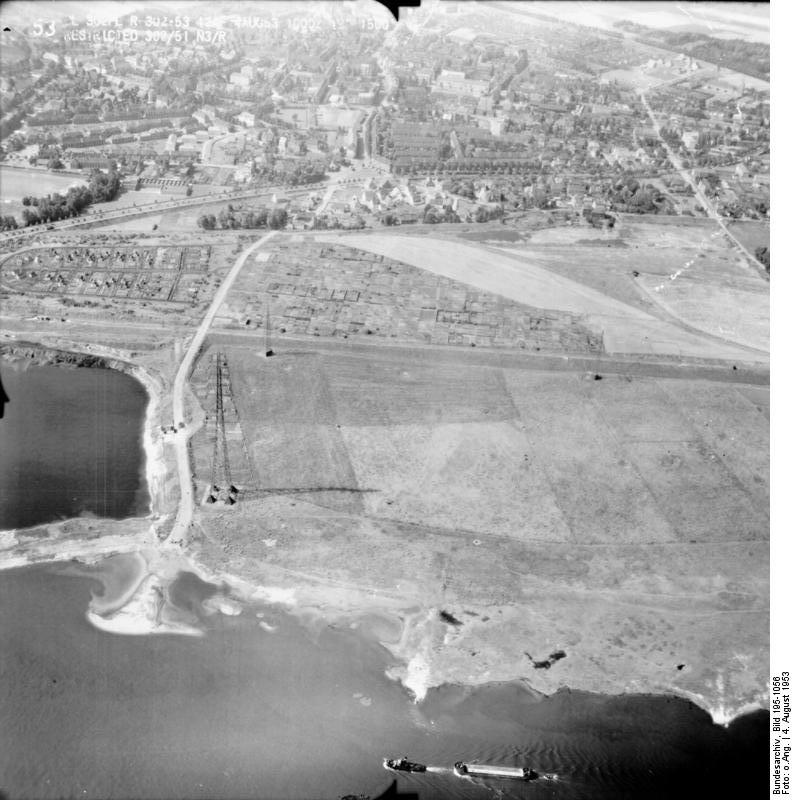 Rheinbefliegung der Alliierten 1953